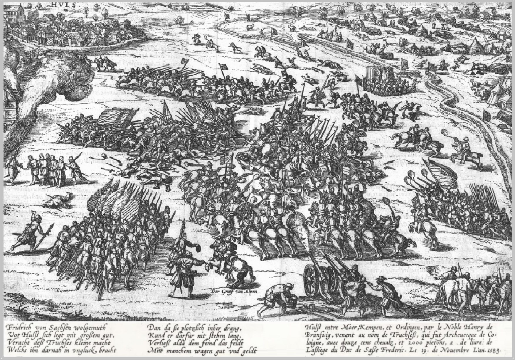 Schlacht von Hüls (1583) Zeichnung des Künstlers Franz Hogenberg aus dem 16. Jahrhundert, entnommen der "Chronik Hüls, 1998" von Werner Mellen